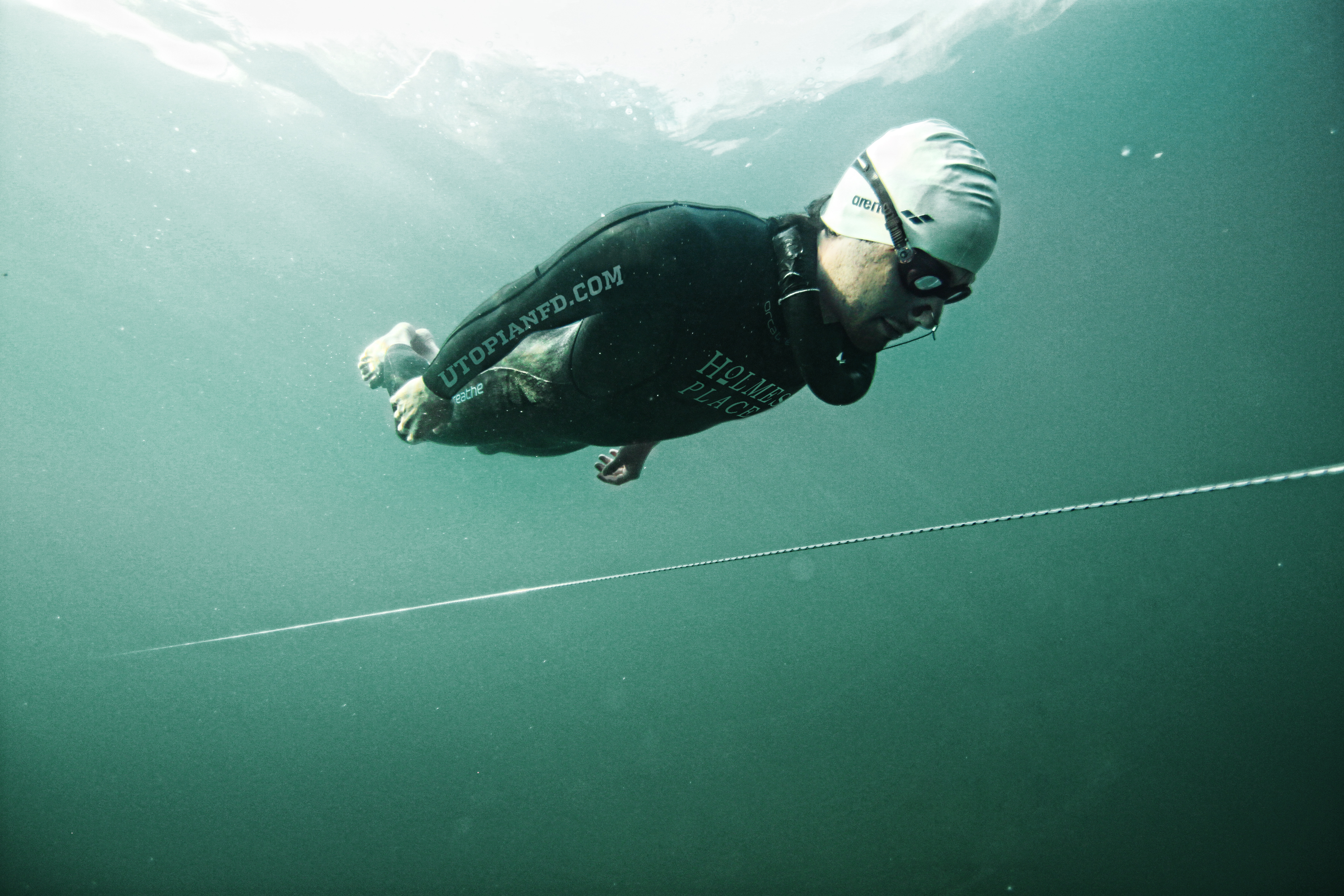 Jonas Krahn beim Streckentauchen im offenen Gewässer